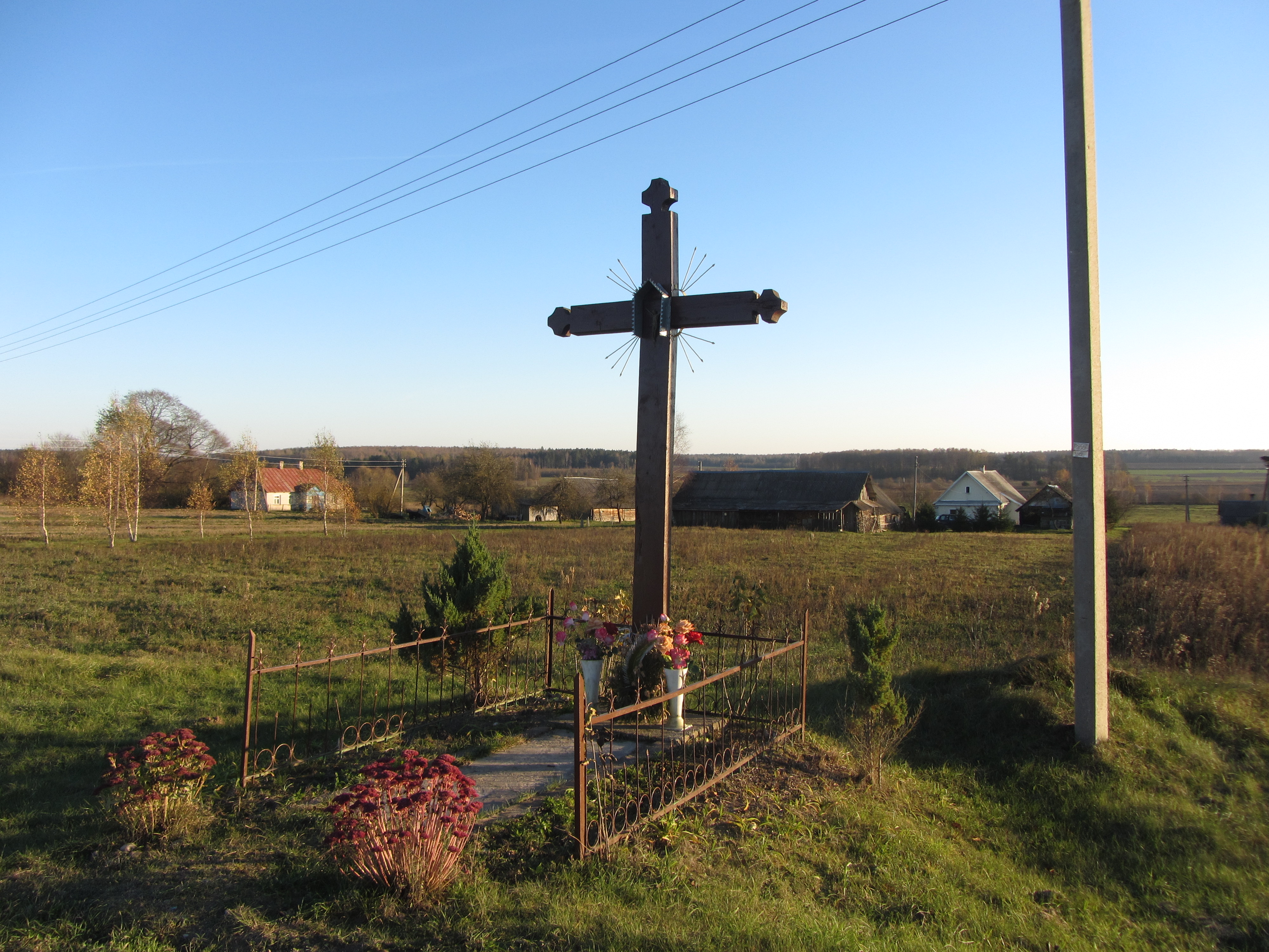 Balandžiai 17206, Lithuania